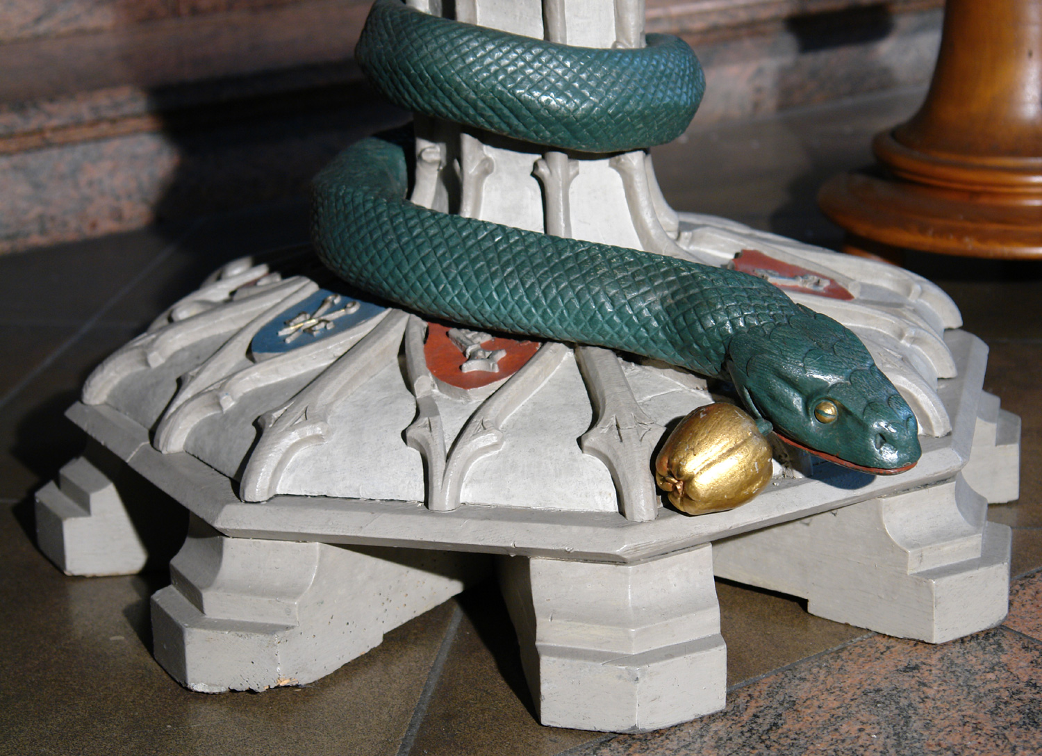 Propsteikirche St. Johann in Bremen. Taufbecken, 1845 von Georg Andreas Steinhäuser angefertigt. Fuß mit fortschleichender Schlange als Symbol der Sünde